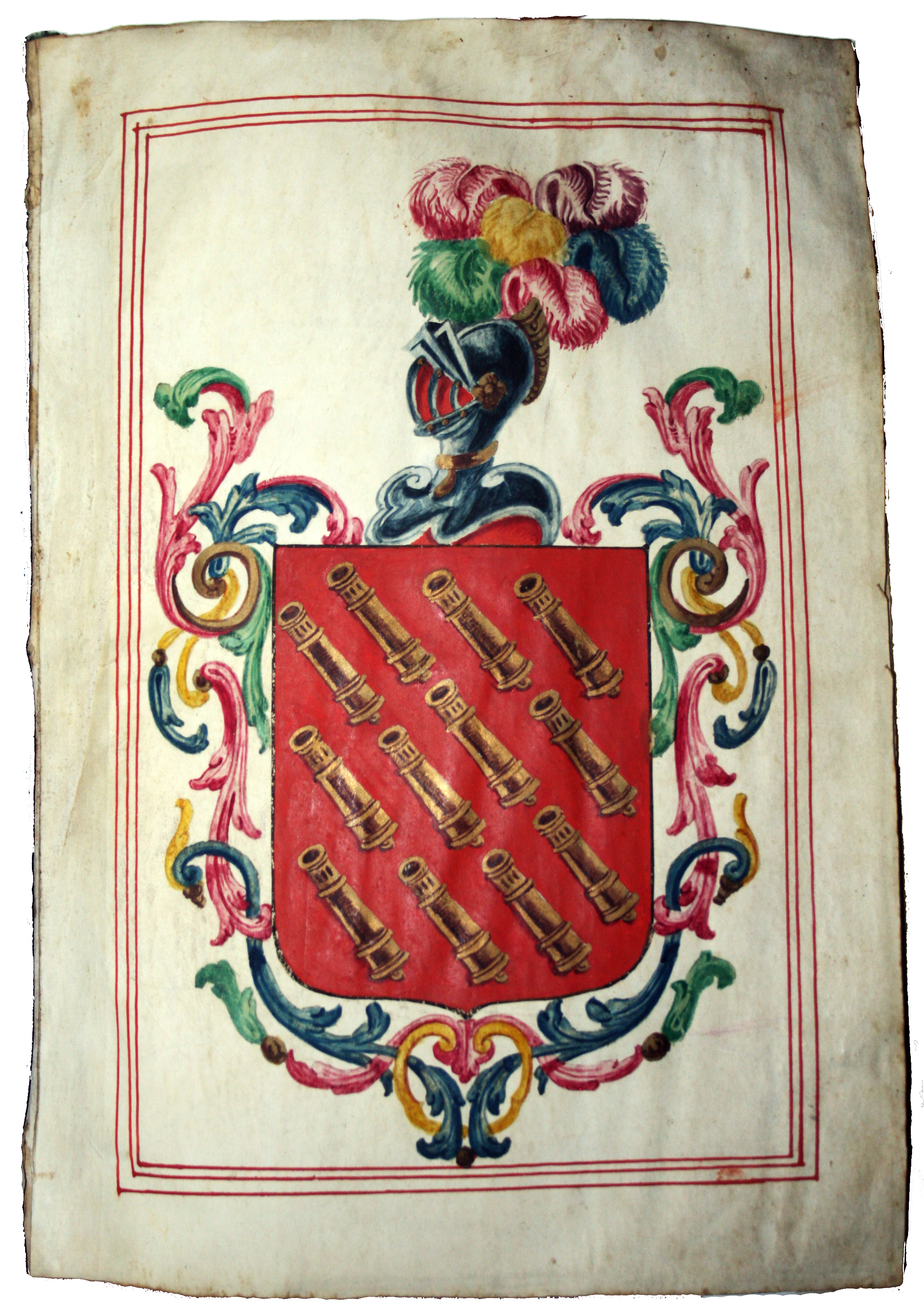 Jatorrizko 1768ko Zizurkilgo armarria